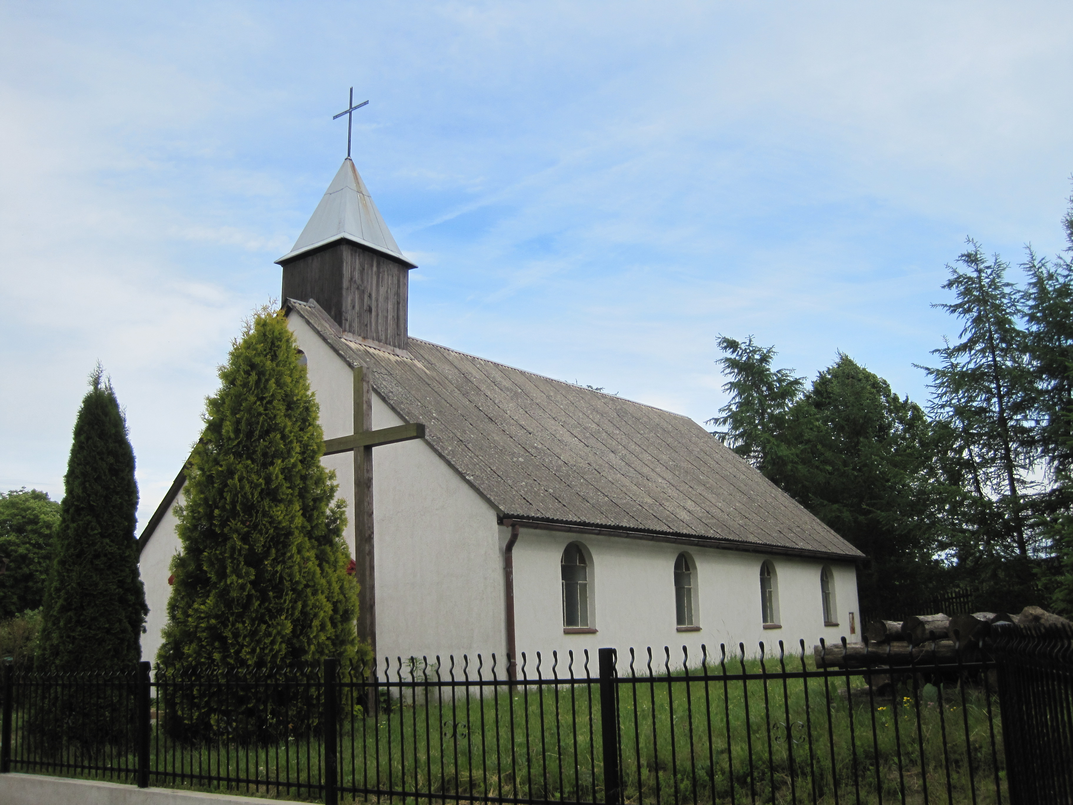 Karwno - rzymskokatolicki kościół filialny pw. Matki Boskiej Nieustającej Pomocy